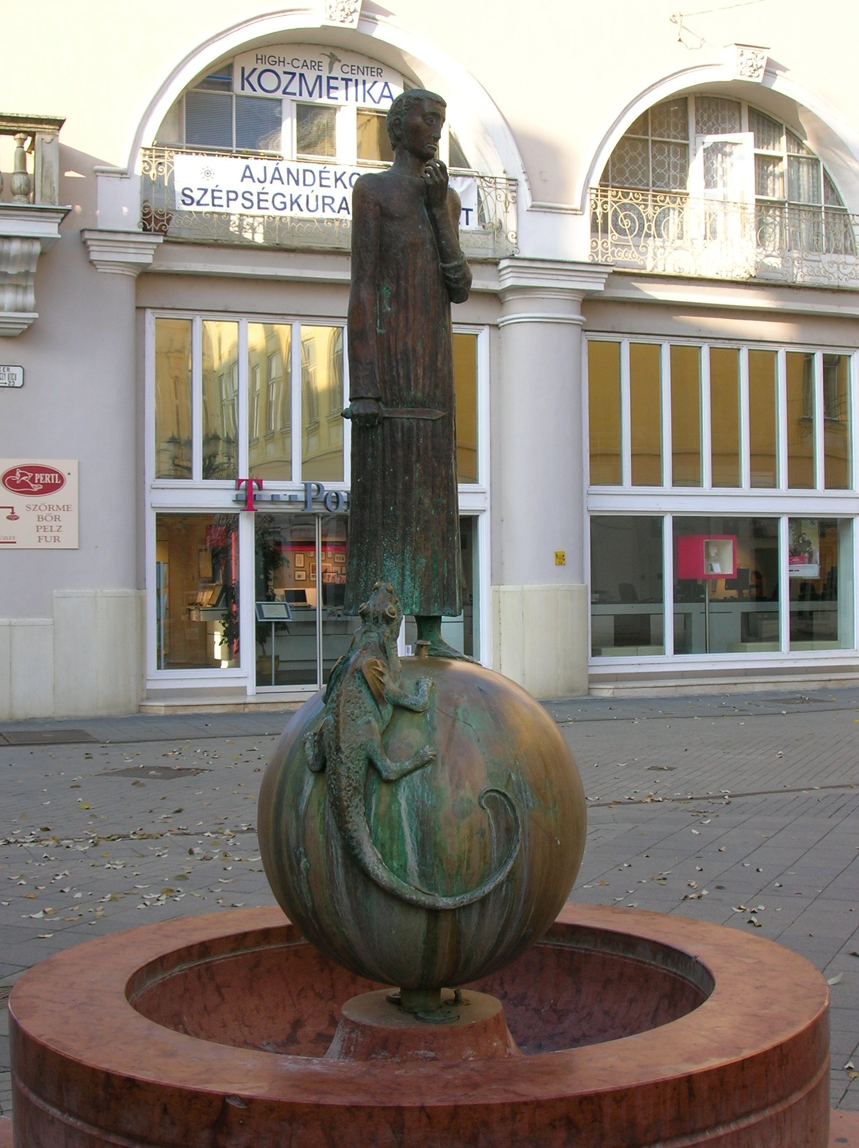 Győr, St. George statue